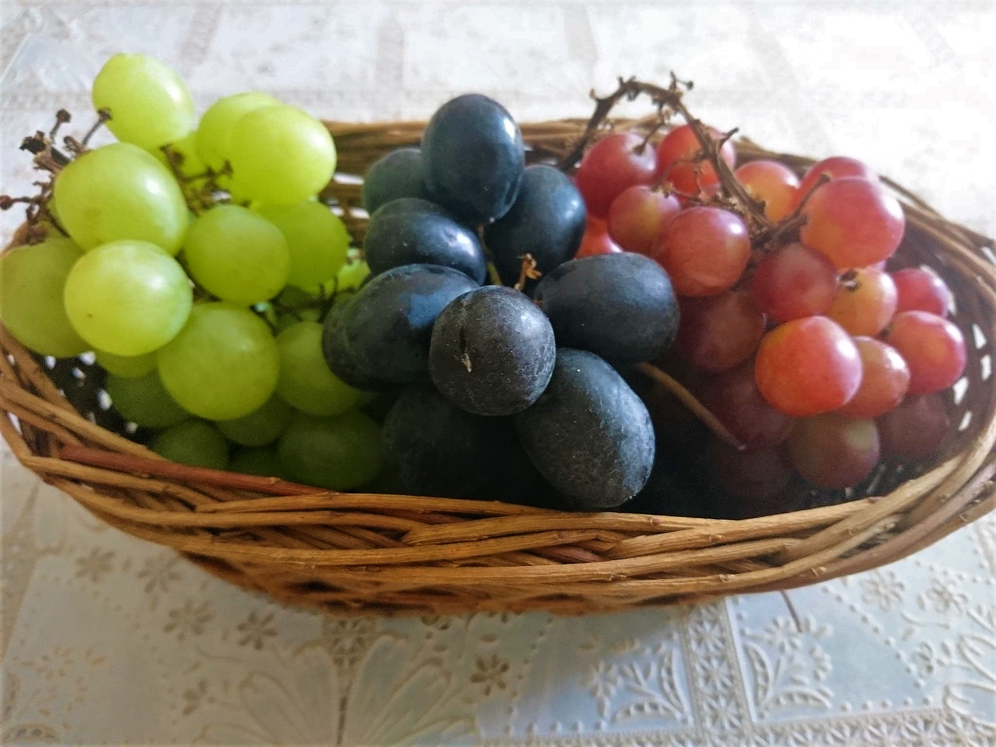 Uva di Puglia